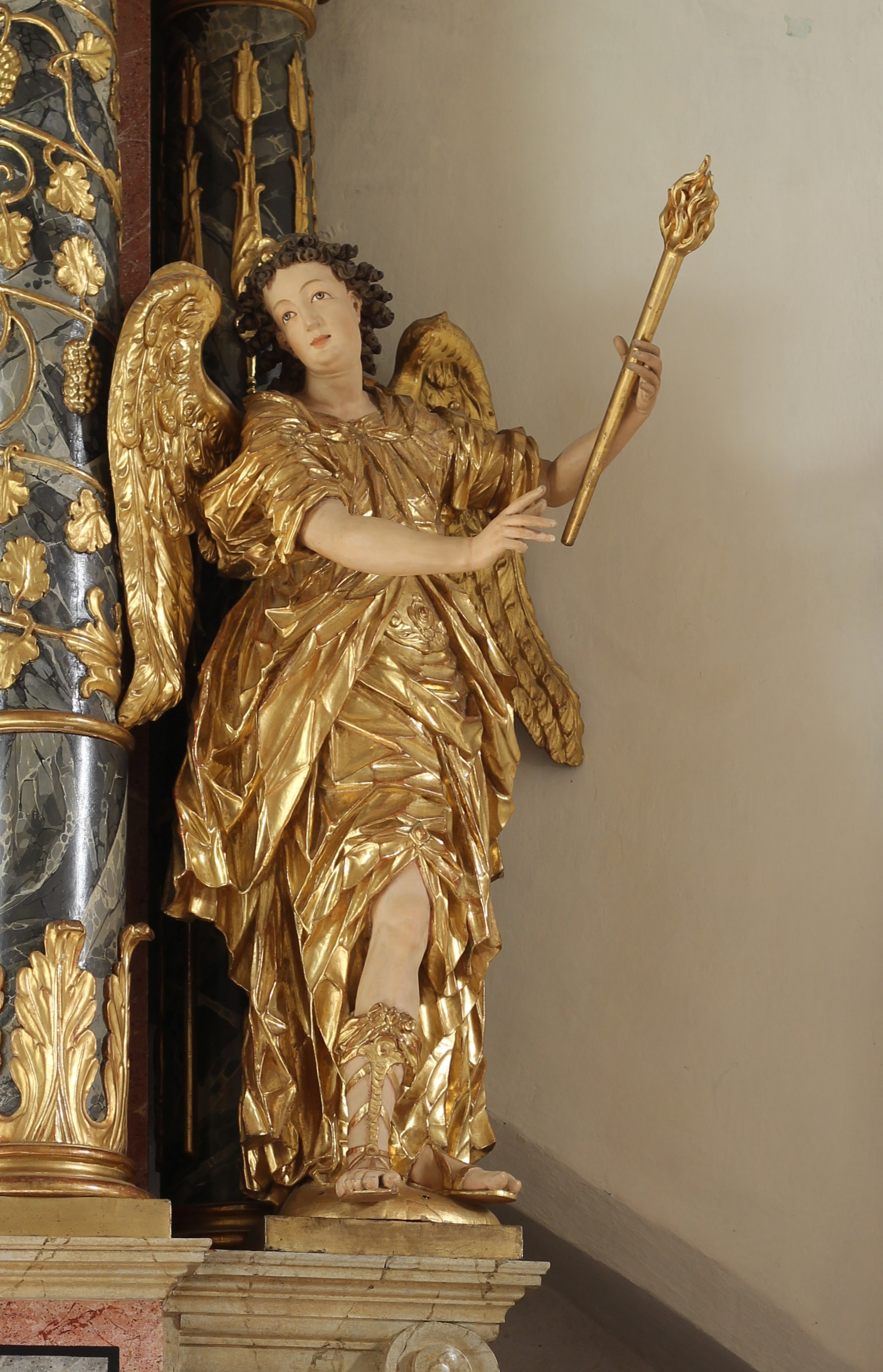 Pfarrkirche St. Peter und Paul in Partschins